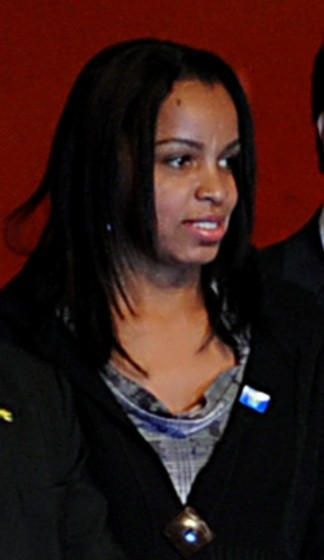 A jogadora de voleibol Fofão na 3ª Conferência Nacional do Esporte.